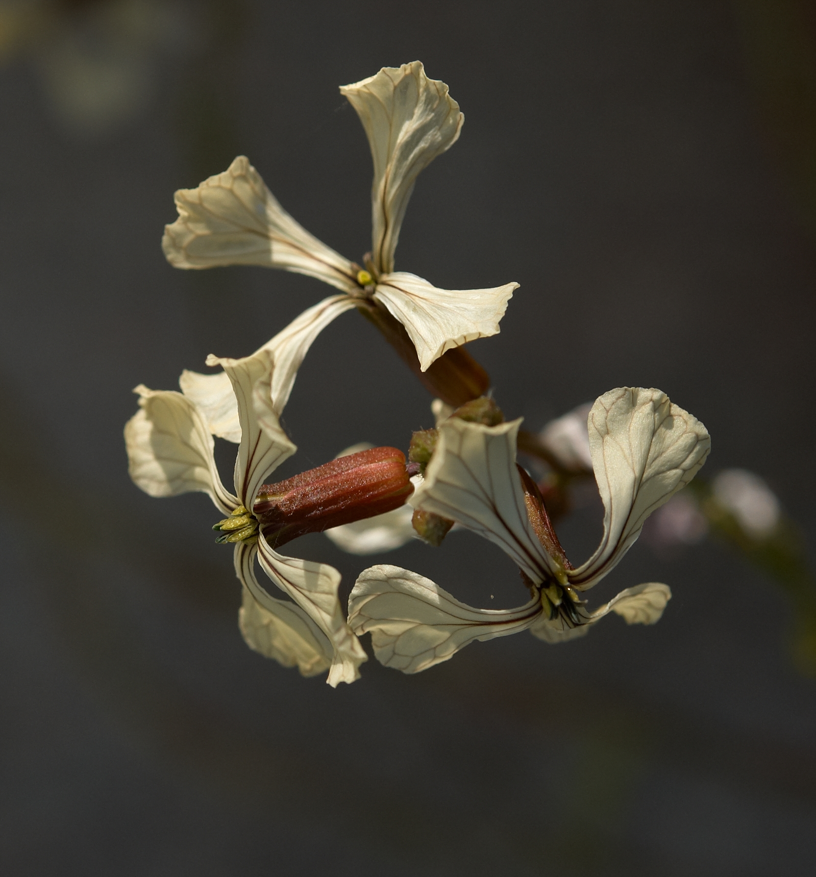 Rucola bloem